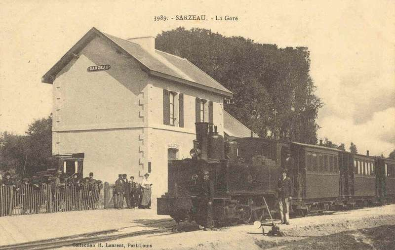 Gare Chemins de Fer du Morbihan de Sarzeau